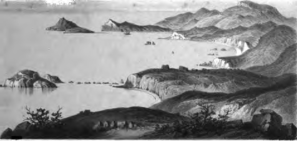 Οι Καλοί Λιμένες σε σε σκίτσο του Thomas Spratt απο το βιβλίο "Travels and researches in Crete" έκδοσης 1865. Διακρίνεται ο χώρος της αρχαίας πόλης Λασσαίας.